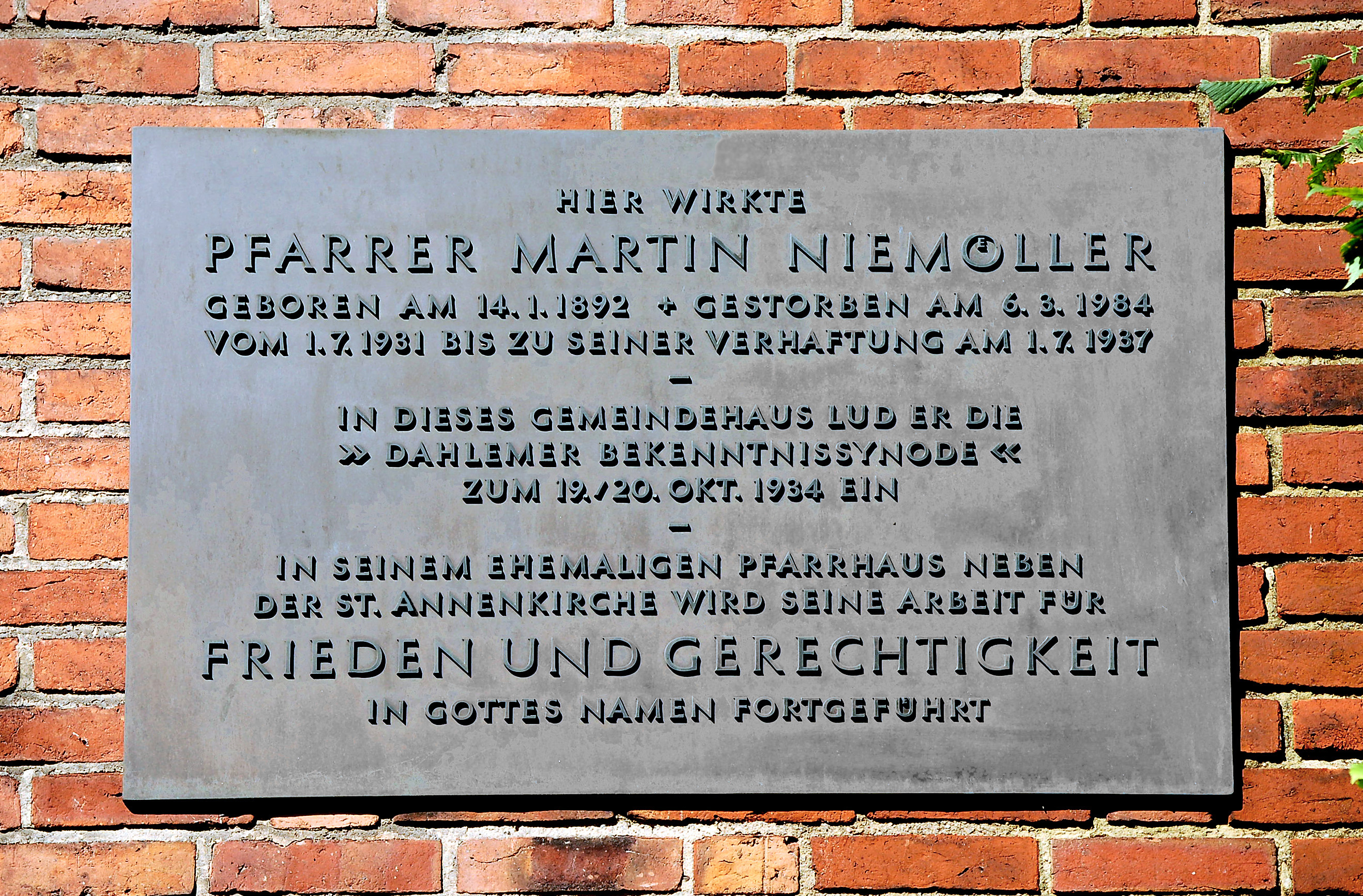 image: Remembrance Bekennende Kirche. Parish Hall, Ev.Kirchengemeinde Dahlem, Berlin, Germany, 2007 , Gemeindehaus, Ev.Kirchengemeinde Dahlem, Berlin, Germany, 2007, Erinnerungsort „Bekennende Kirche“. Image: image produced by Berkan, 2007, picture shows “Remembrance Bekennde Kirche”, Berlin-Dahlem, Germany, Gedenktafel der Bekennenden Kirche, Bekenntnissynode 19./20.Okt. 1934